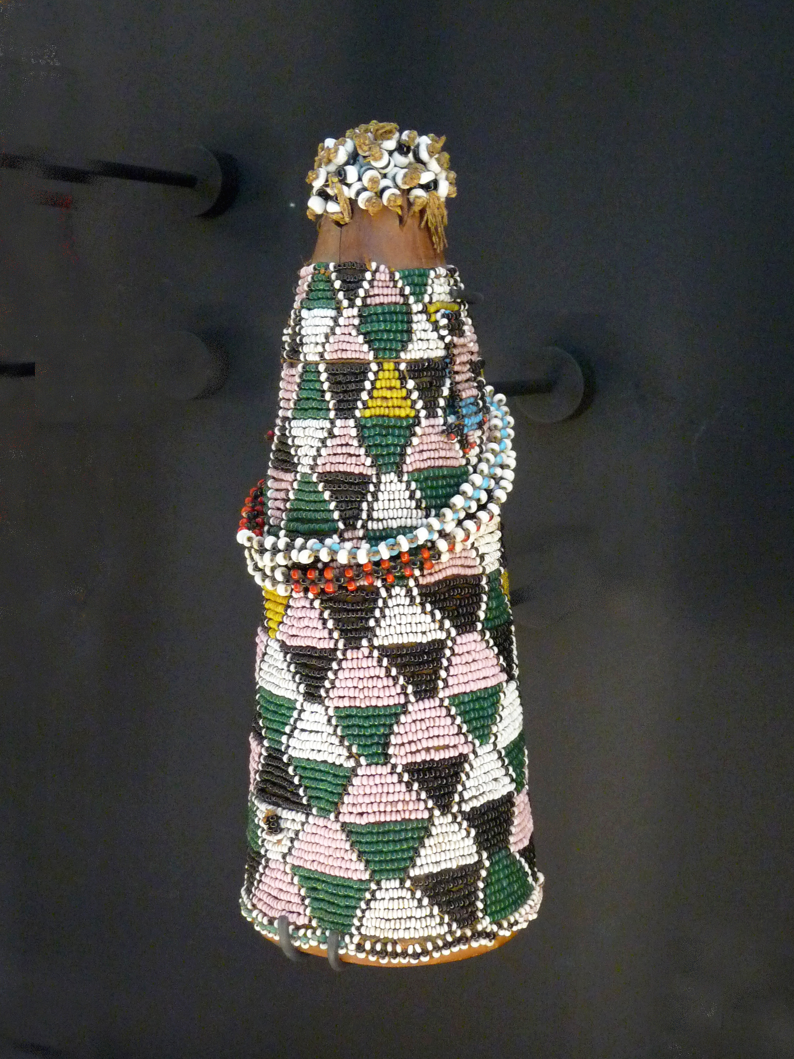 Poupée de fécondité Sotho, bois et perles, Lesotho. Musée du quai Branly.